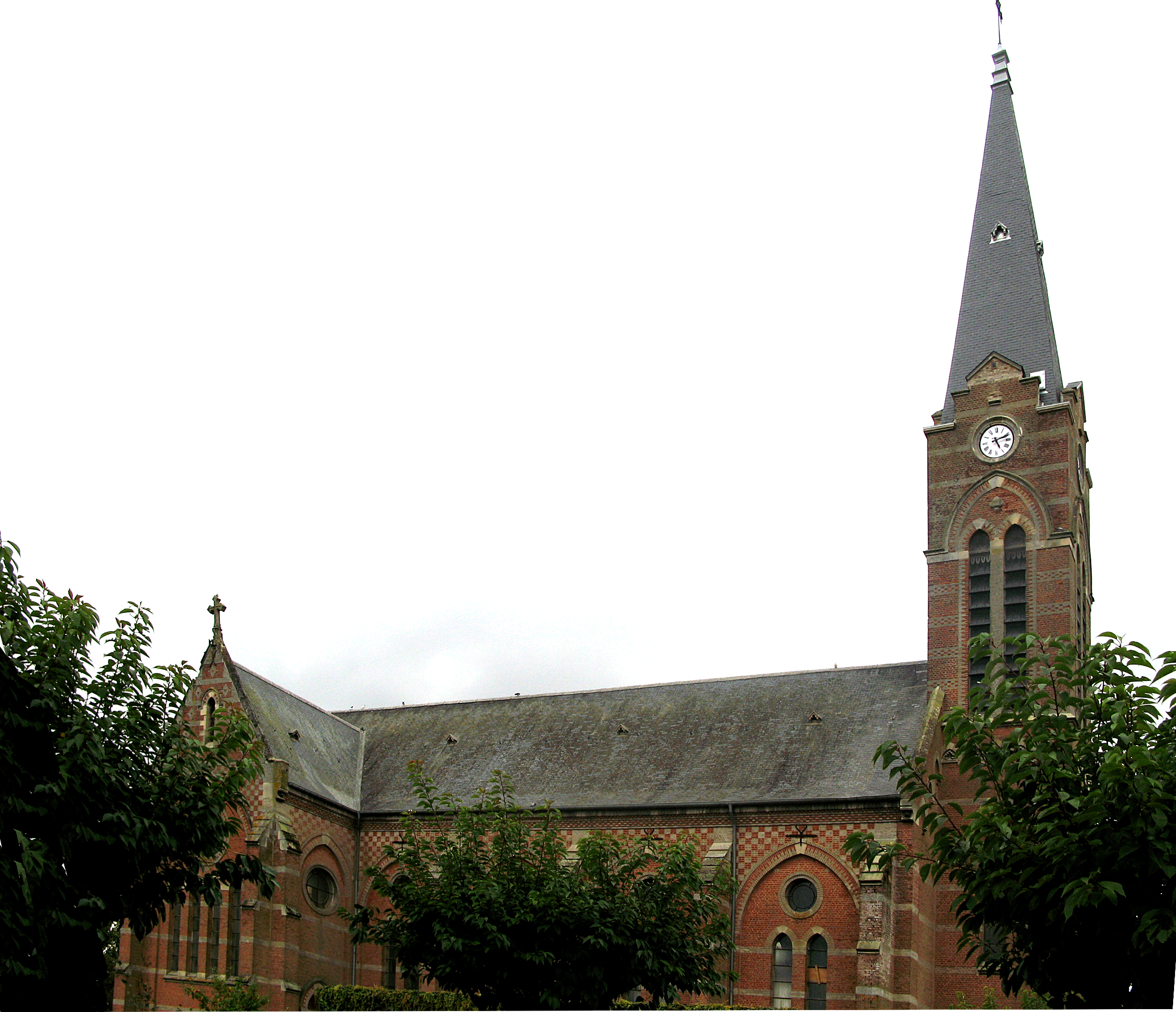 Bonneville (Somme, France) - L'église (en briques).